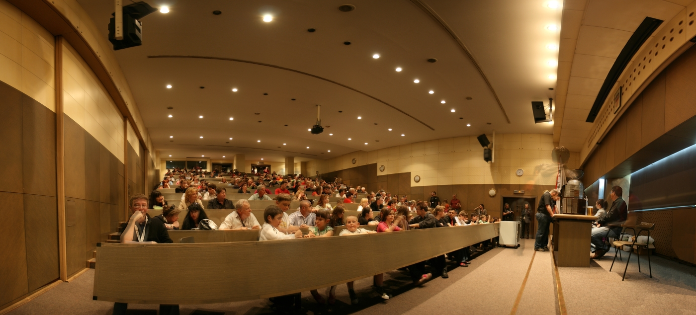 SFeraKon, Zagreb